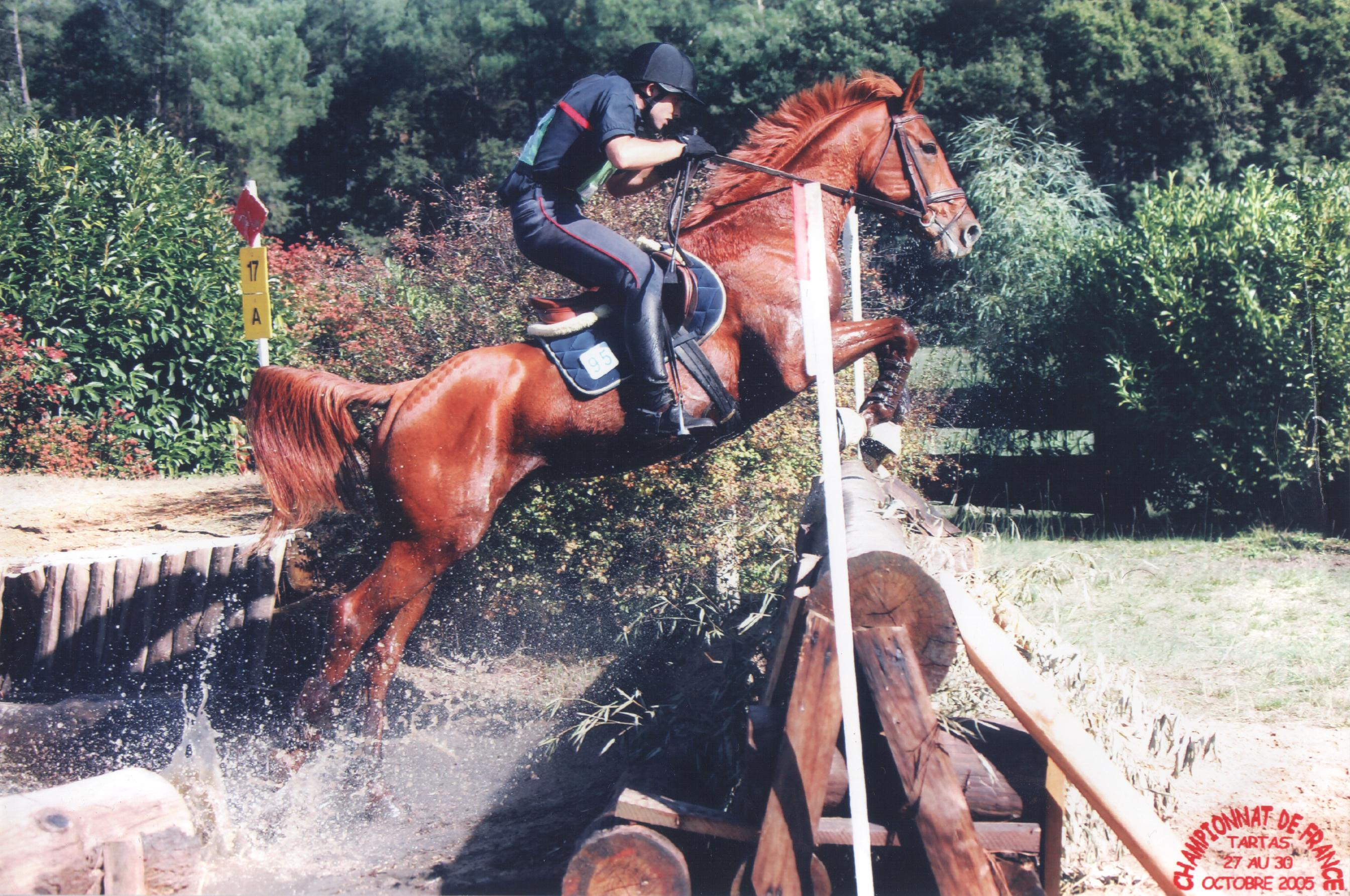 un obstacle gué sur un cross de CCE